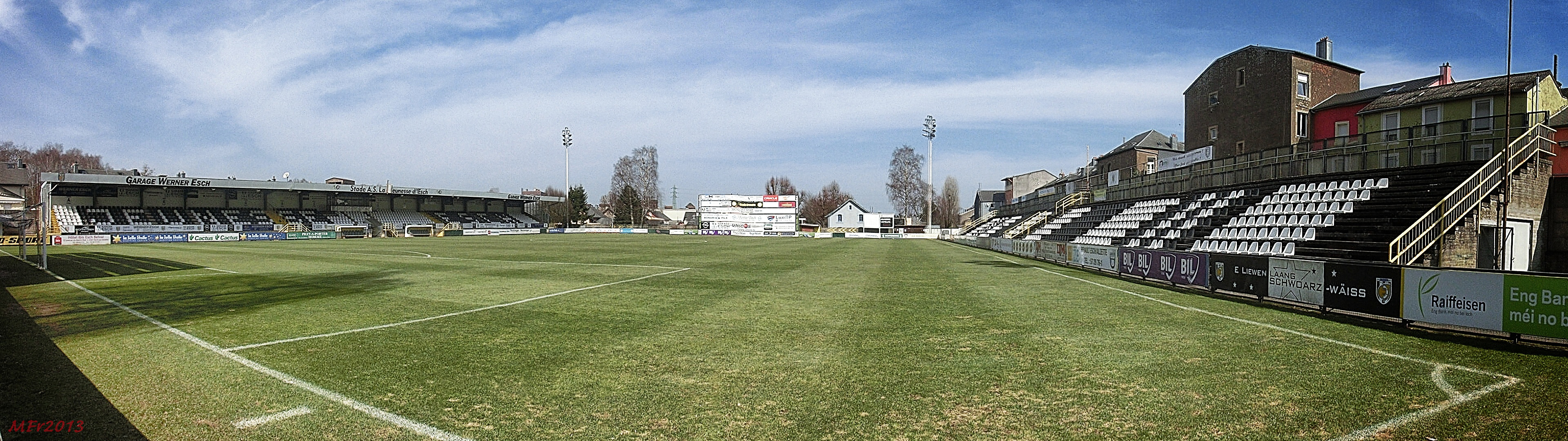 Blick auf die Haupttribüne und die Gegentribüne Stadion Op der Grenz in Esch an der Alzette. Heimat von Jeunesse Esch